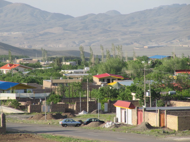 منظره روستای خاوه